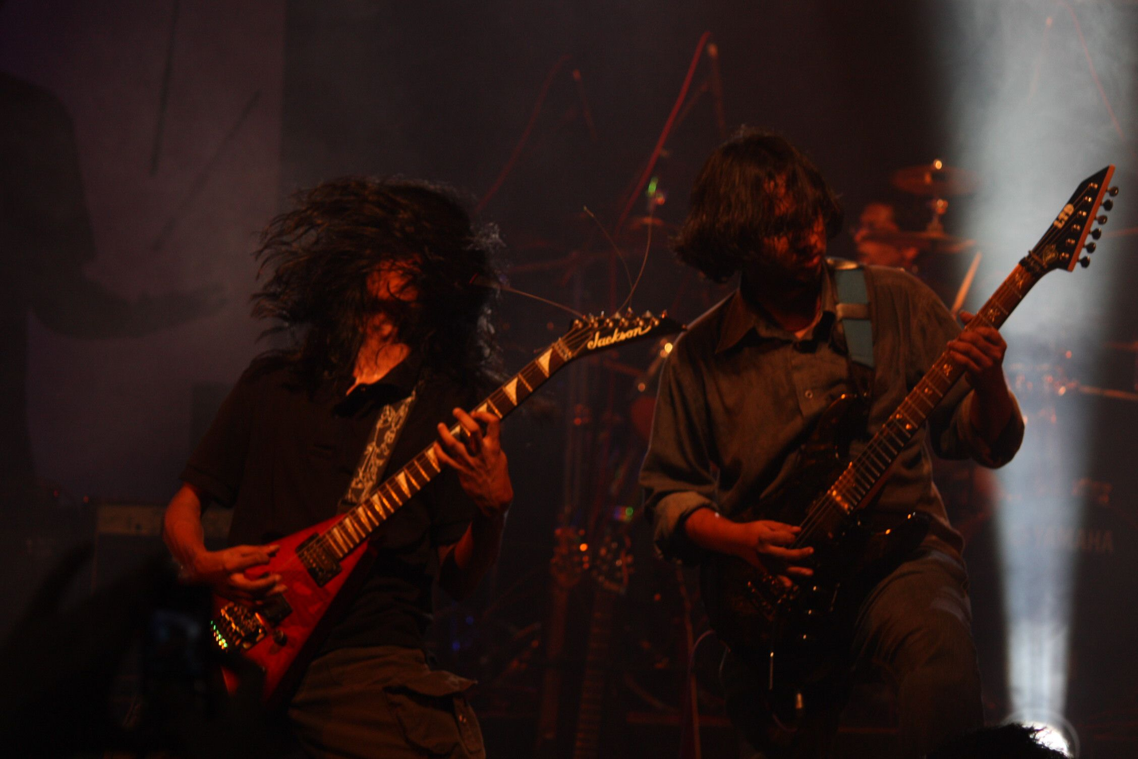 Powersurge